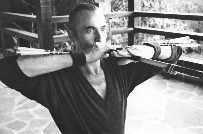 L’usage du « PHI » de l'école du souffle "Sarbacana" est un procédé impliquant un tout autre protocole de lecture que les modes habituels de visée. Le principe étant de mettre en synergie consciente des stimulus captés par des systèmes sensoriels différents. Placer les sensations kinesthésiques en résonances synesthésiques avec la perception visuelle.